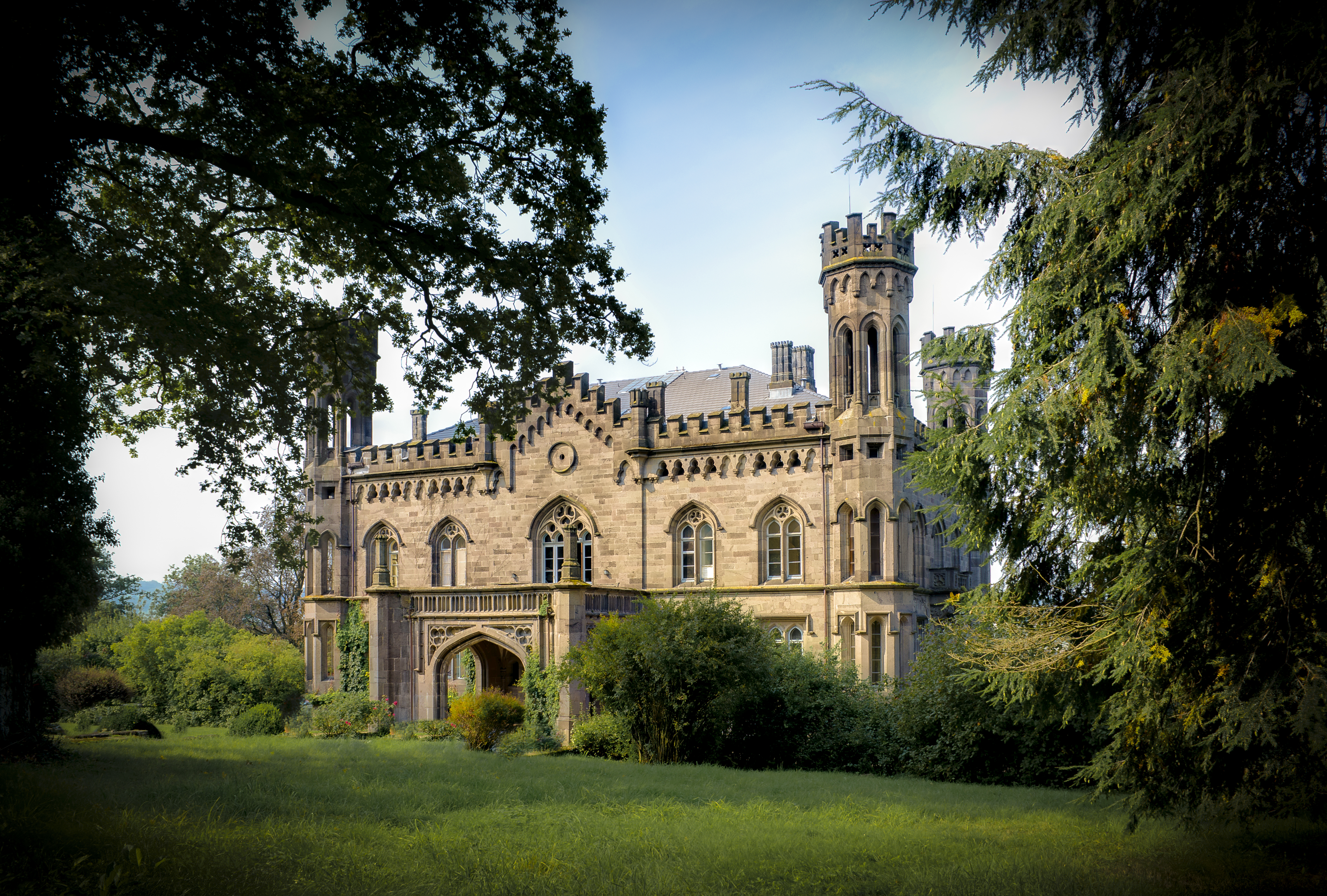 Schloss Friedelhausen, HDR-Aufnahme (daher nicht farbtreue Darstellung)